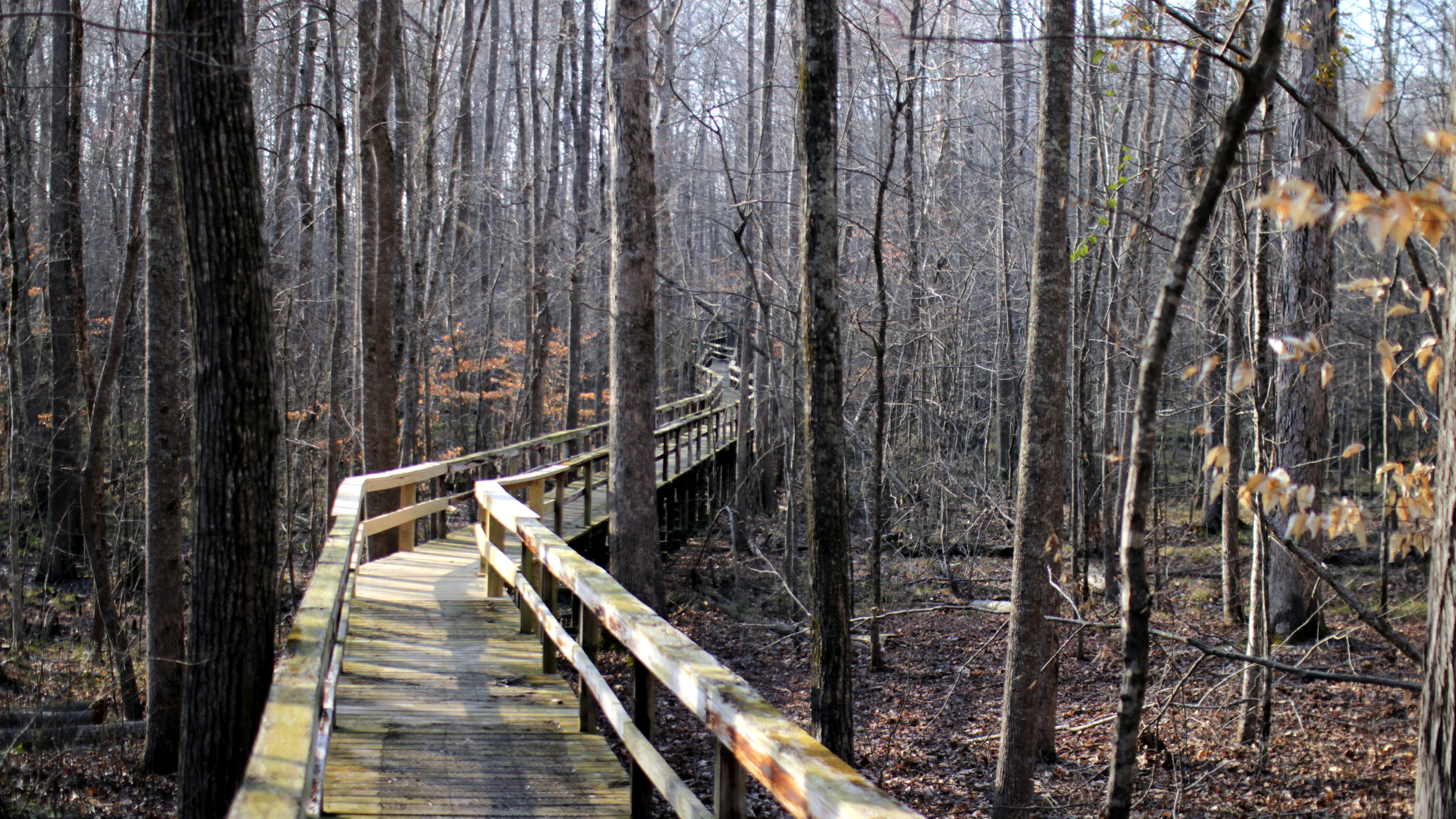 Big Hill Pond State Park Tennessee, 2013